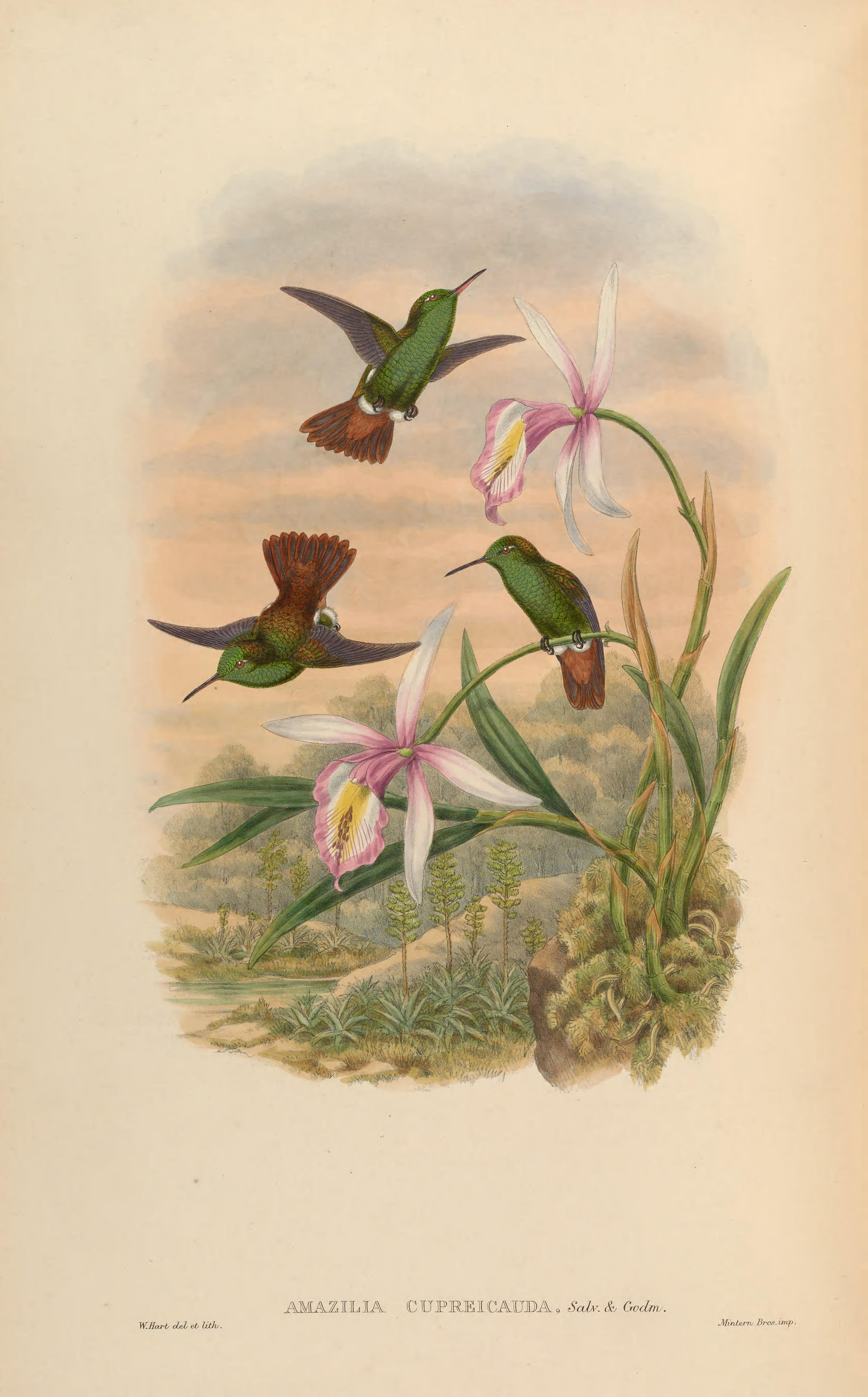 Amazilia cupreicauda = Amazilia viridigaster cupreicauda [1]